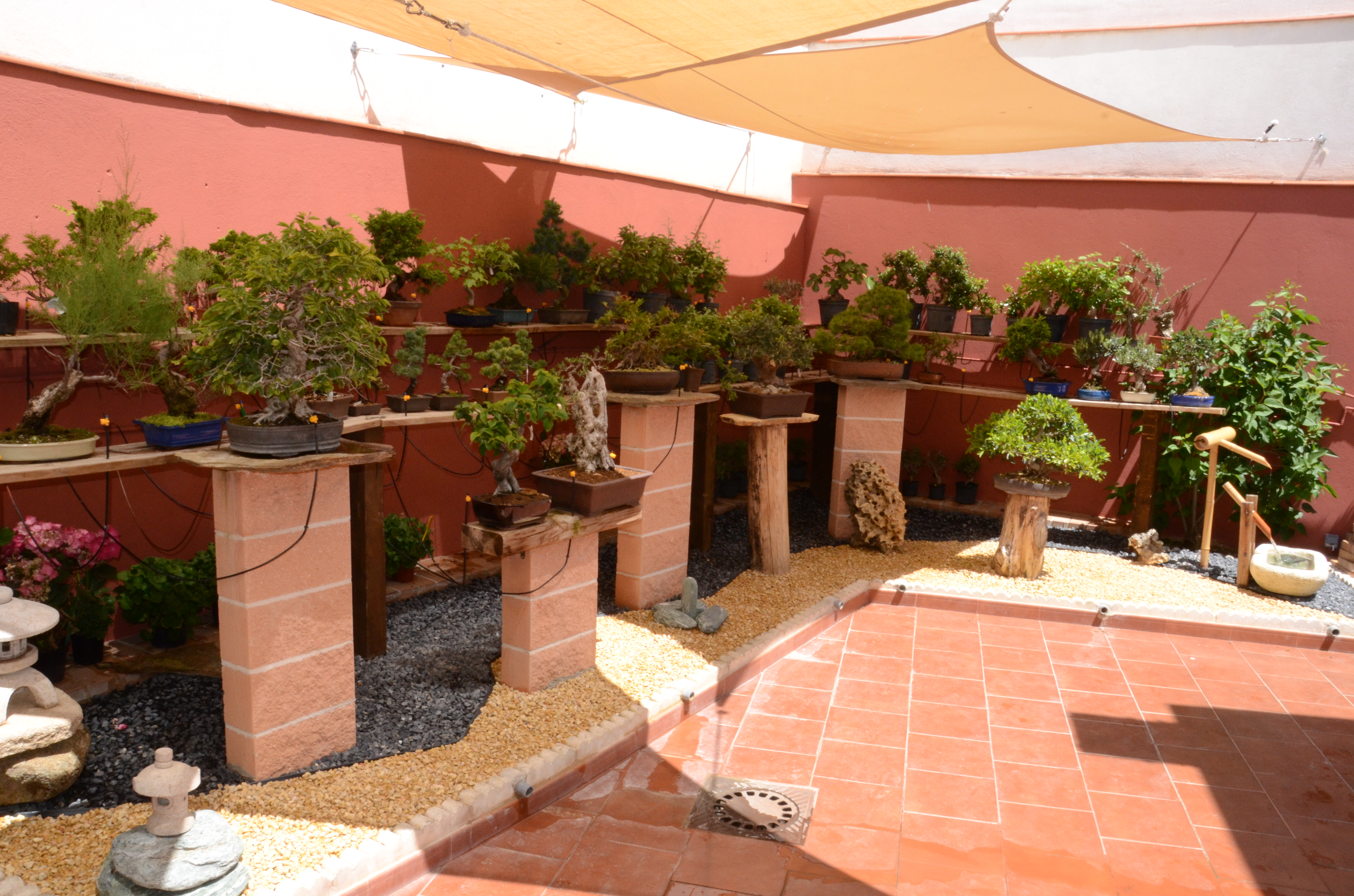 Bonsais La Perla (Madrid)